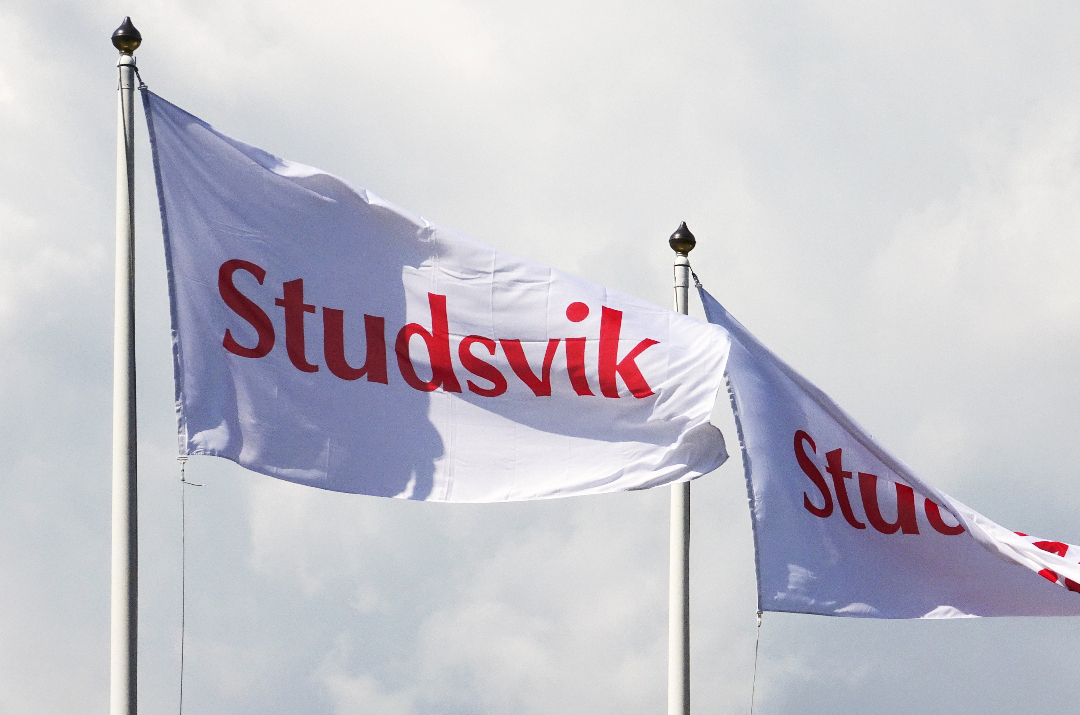 Studsvik AB logo